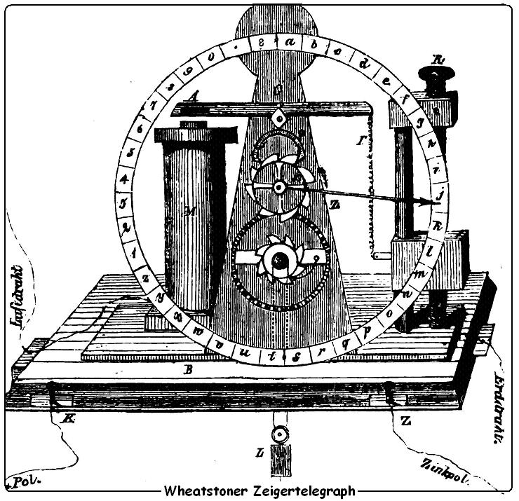 Wheatstone Zeigertelegraph